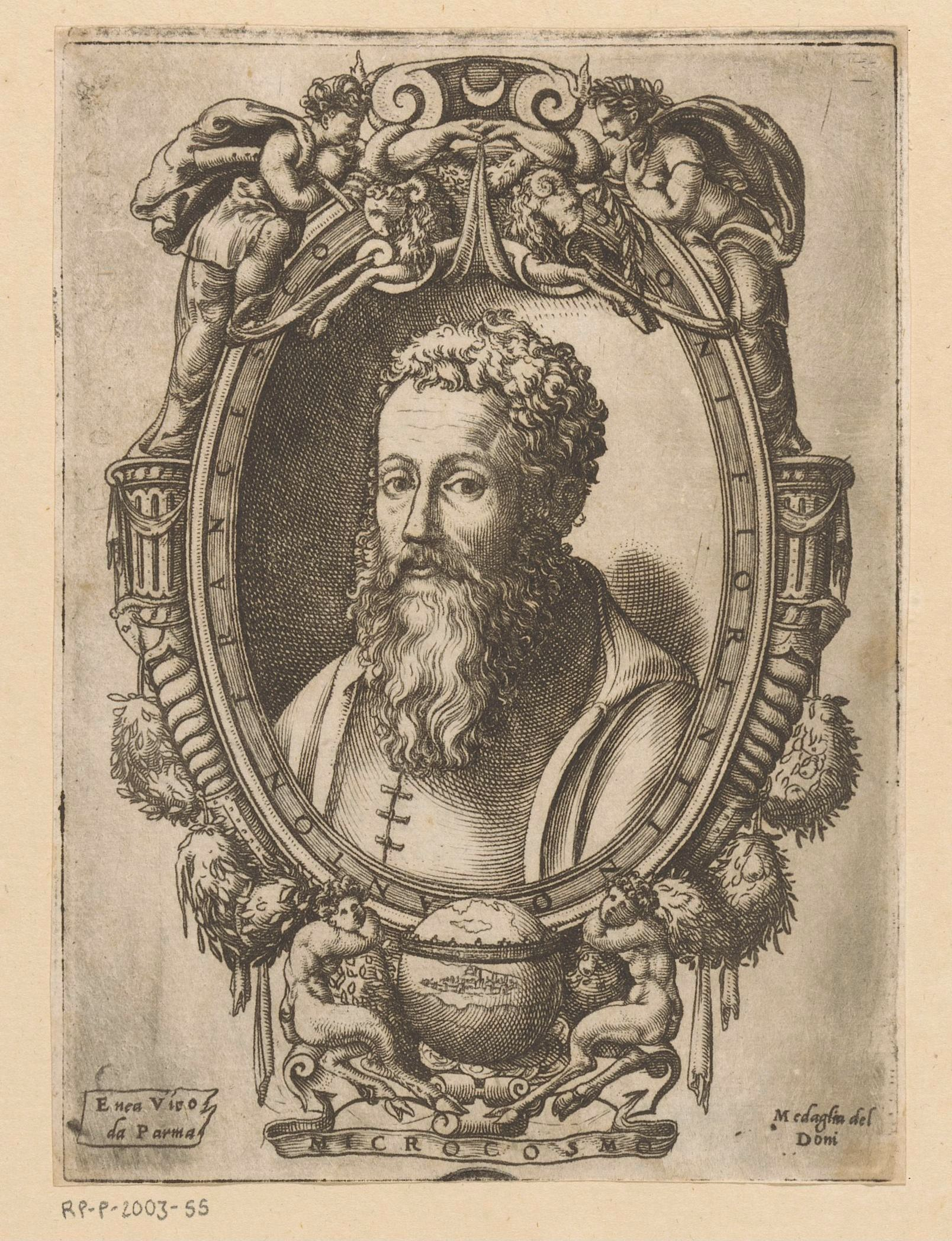 IdentificatieTitel(s): Portret van schrijver Anton Francesco DoniPenningen van Anton Francesco Doni (serietitel)Medaglie del Doni (serietitel)Objecttype: prent Objectnummer: RP-P-2003-55Catalogusreferentie: The Illustrated Bartsch 245Bartsch 245Opschriften / Merken: verzamelaarsmerk, verso, gestempeld: Lugt 2228verzamelaarsmerk, verso, gestempeld: Lugt 2760Omschrijving: Portret van Anton Francesco Doni, gevat in een geornamenteerde lijst.VervaardigingVervaardiger: prentmaker: Enea Vico (vermeld op object)Plaats vervaardiging: ItaliëDatering: 1550Fysieke kenmerken: gravure met plaattoonMateriaal: papier Techniek: graveren (drukprocedé) / plaattoonAfmetingen: plaatrand: h 153 mm × b 113 mmOnderwerpWat: historical personsportrait of a writerWie: Anton Francesco DoniVerwerving en rechtenVerwerving: onbekend 2003Copyright: Publiek domein